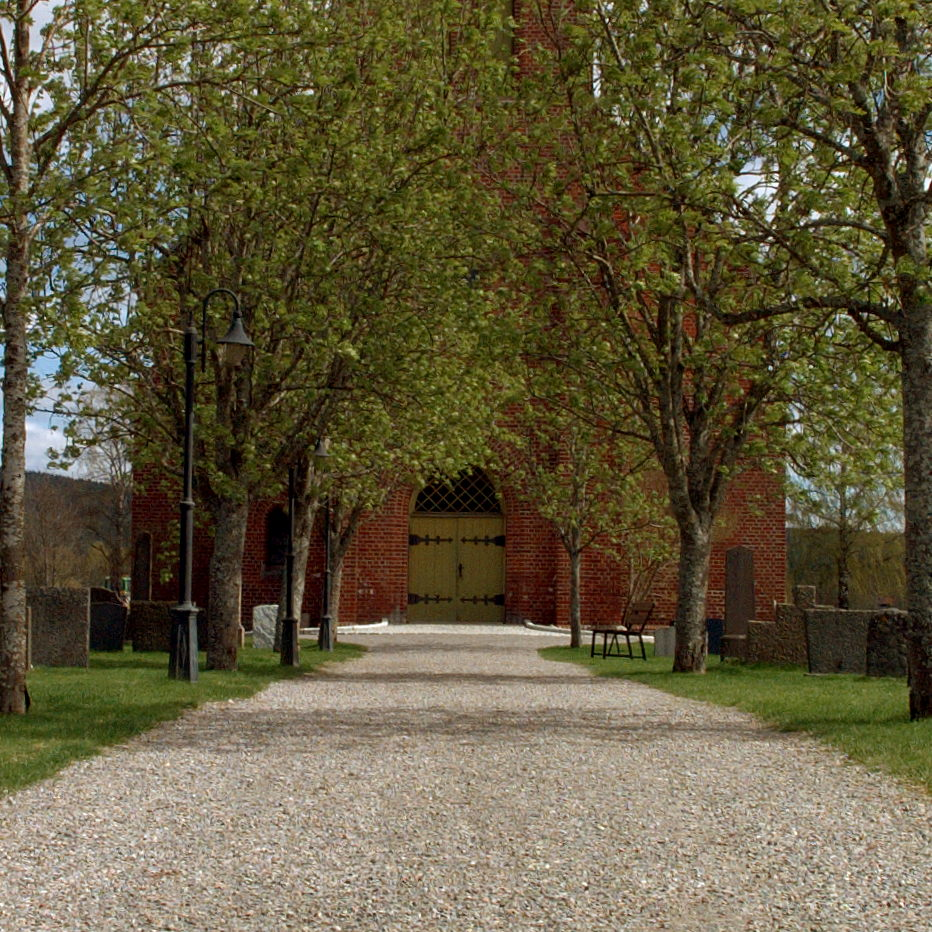 Ullern kirke i Sør-Odal